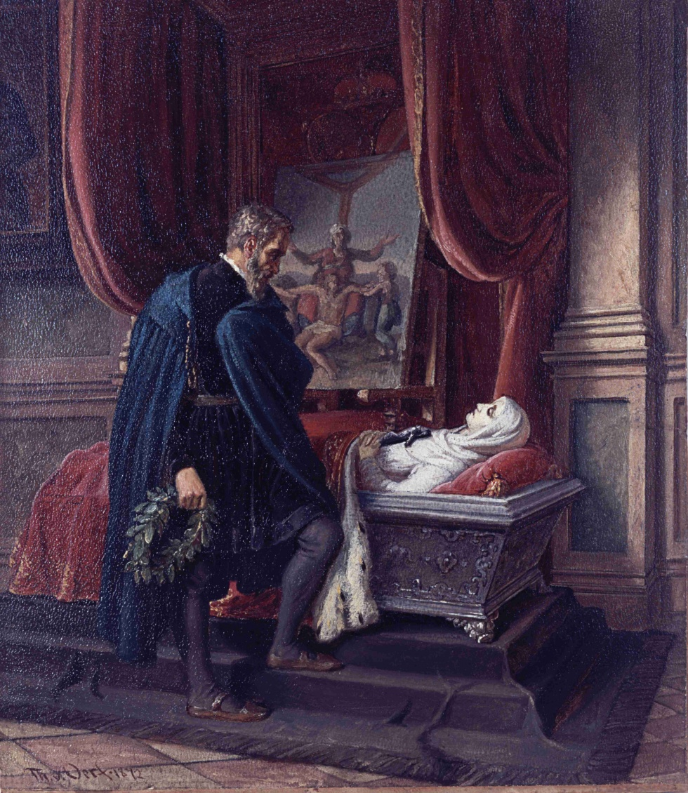 Michelangelo am Sarg der Vittoria Colonna; Ölskizze auf Papier, 34 x 29 cm; Museum Abtei Liesborn